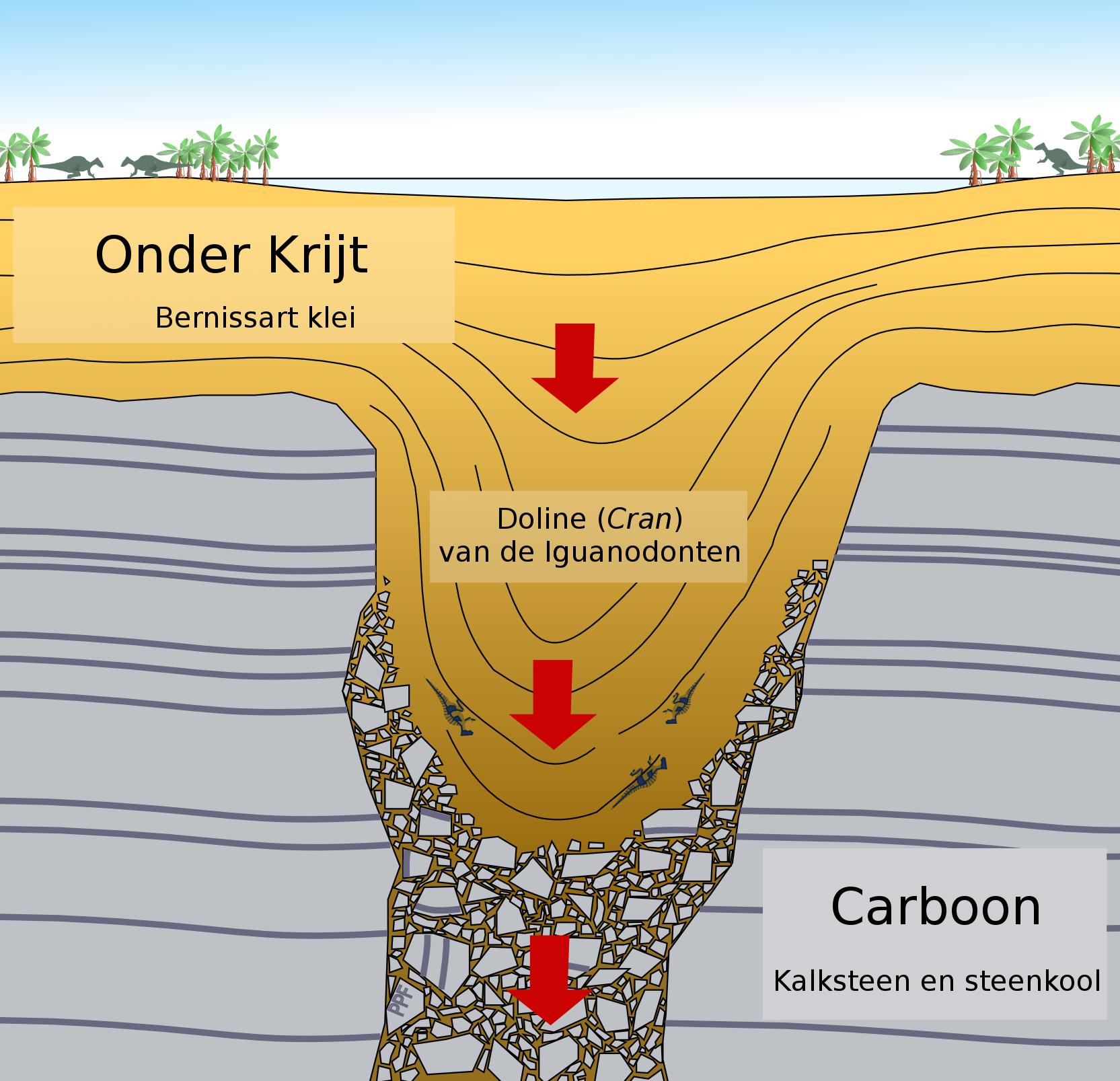 Schema van de Cran des Iguanodons in Bernissart, België